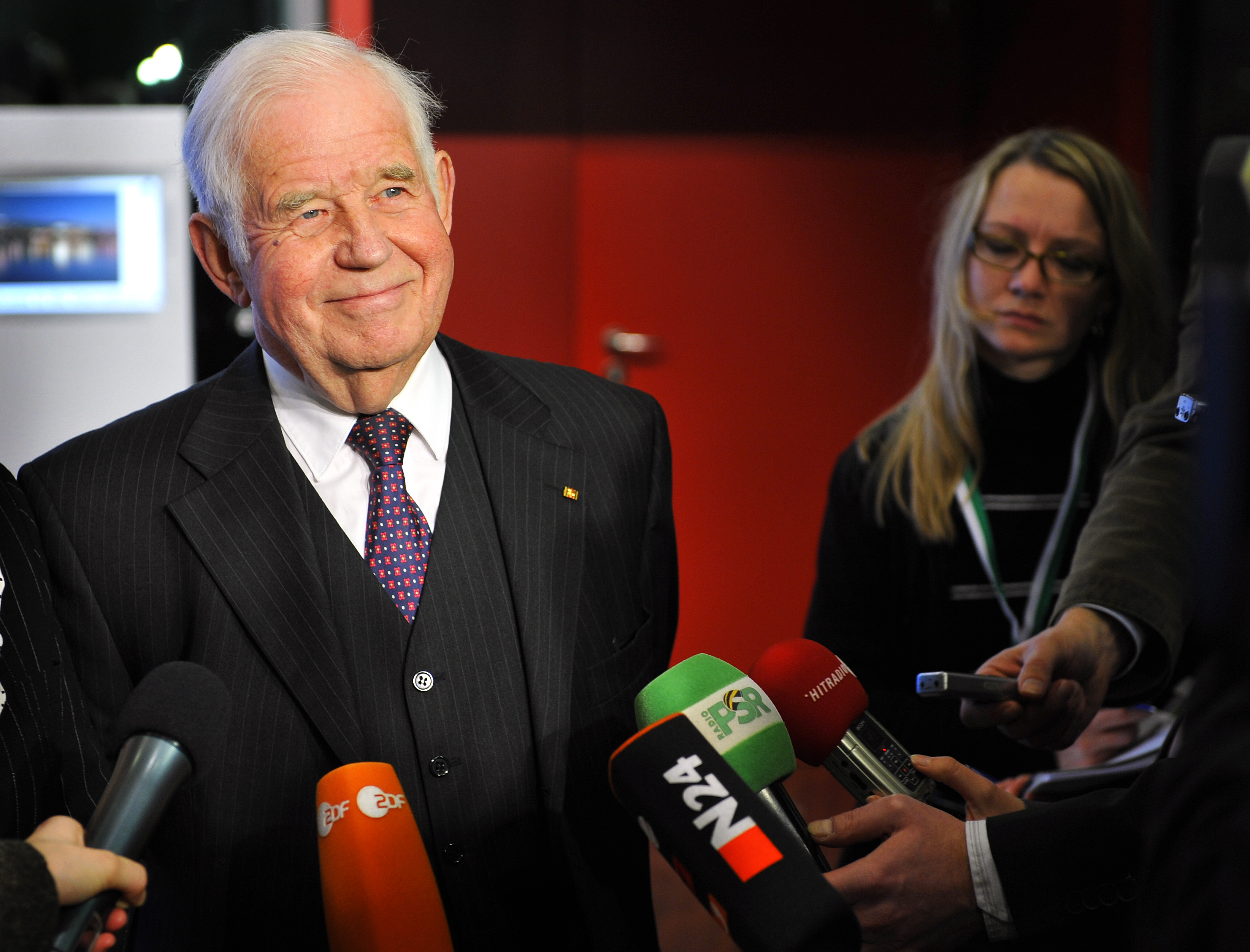 80. Geburtstag von Kurt Biedenkopf 2010 (in Dresden)